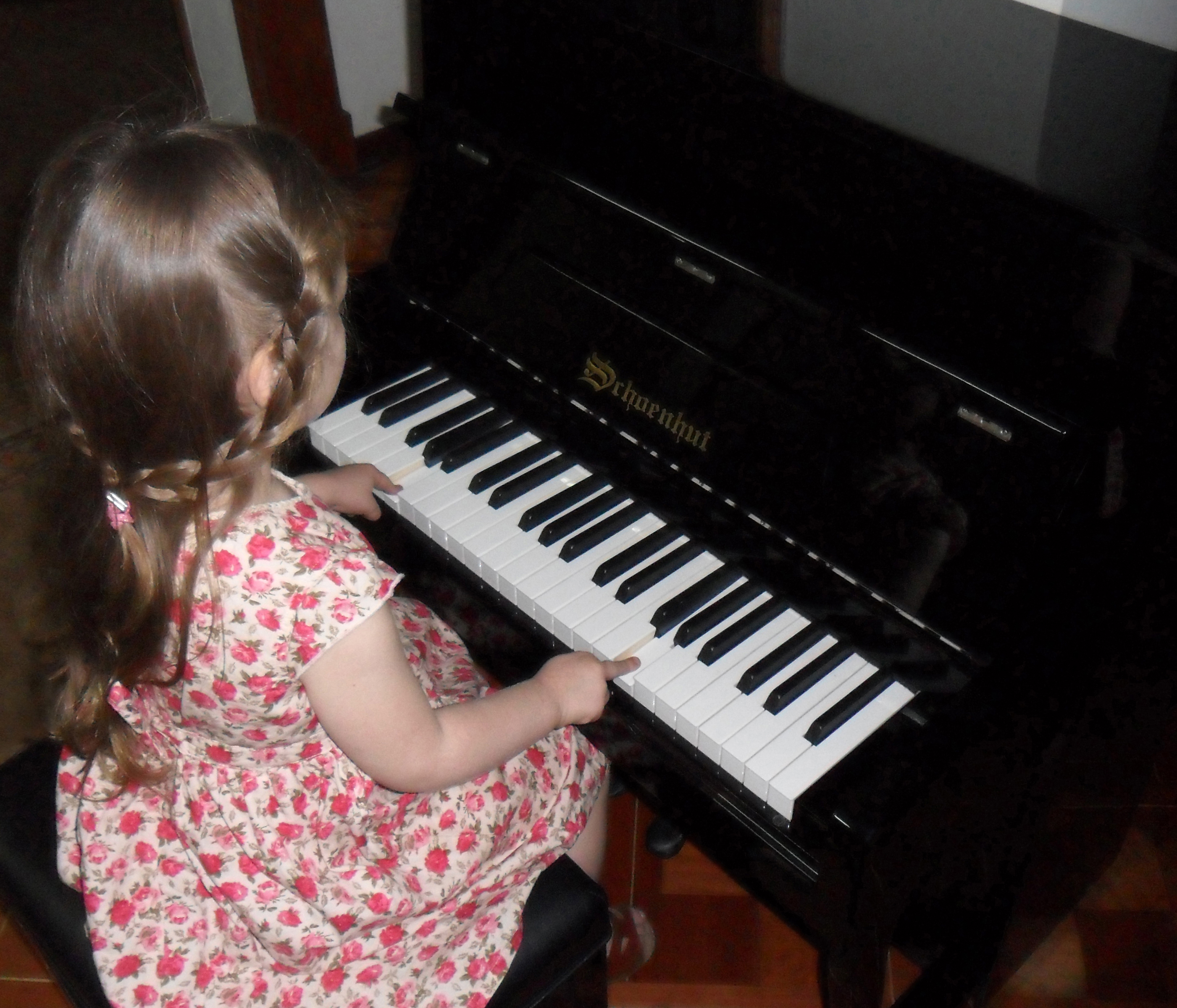 Piano de juguete